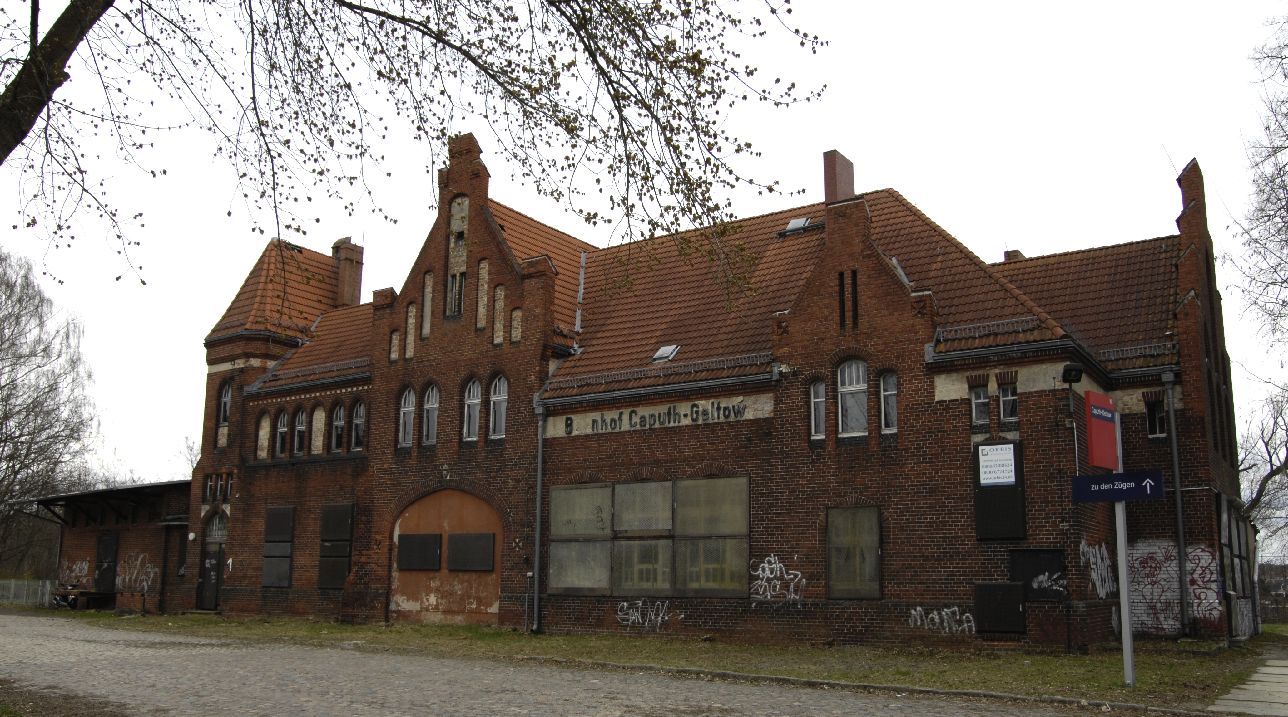 ehemaliges Empfangsgebäude des Bahnhofs Caputh-Geltow (heute nur noch Haltepunkt) in Caputh, Gemeinde Schwielowsee, Land Brandenburg; erbaut um 1908; unter Denkmalschutz